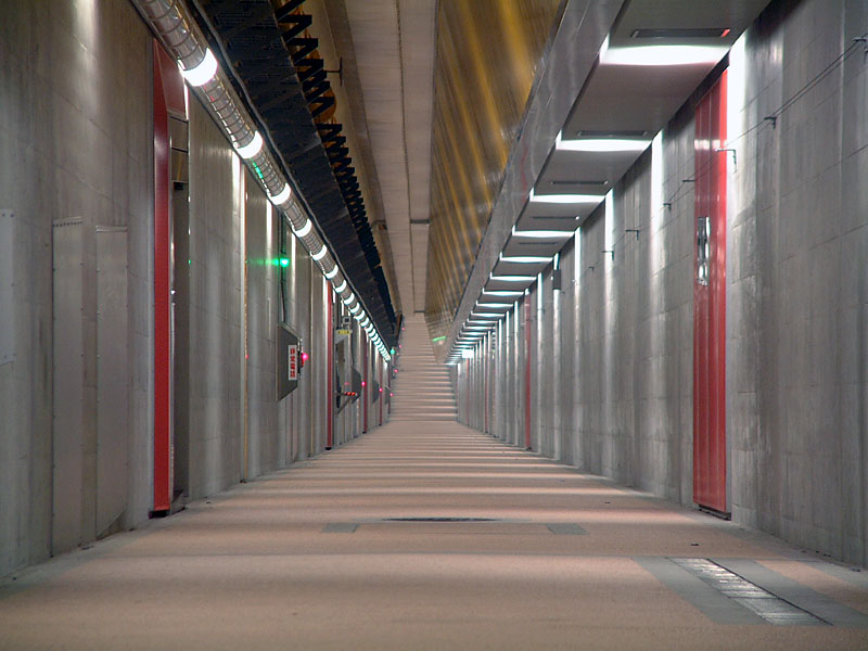 新潟市新潟島と新潟西港をつなぐ水底道路「新潟みなとトンネル」のトンネル内歩道。